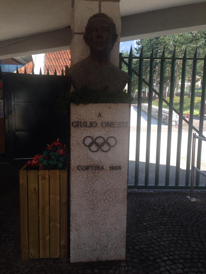 Busto dedicato a Giulio Onesti, posto all'entrata dello stadio del ghiaccio di Cortina. Opera propria, fotografia scattata di persona.